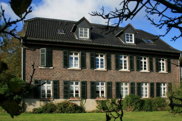 Denkmal Nr. 20 in Willich